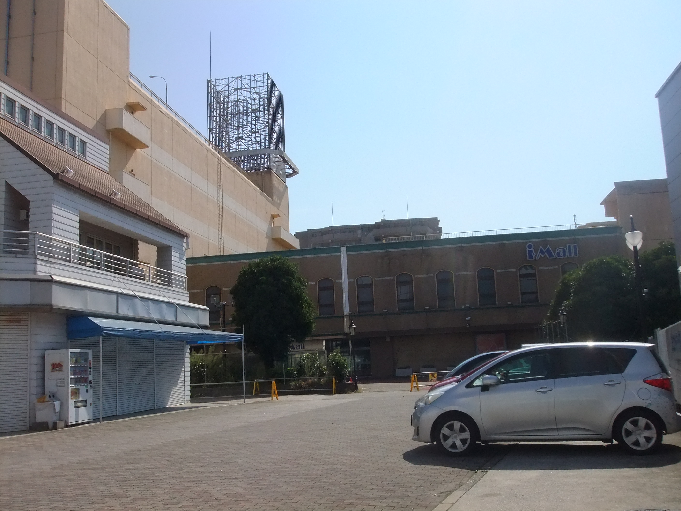 市原ショッピングスクエアビル「かねたや家具側入口(2017年10月9日撮影)」